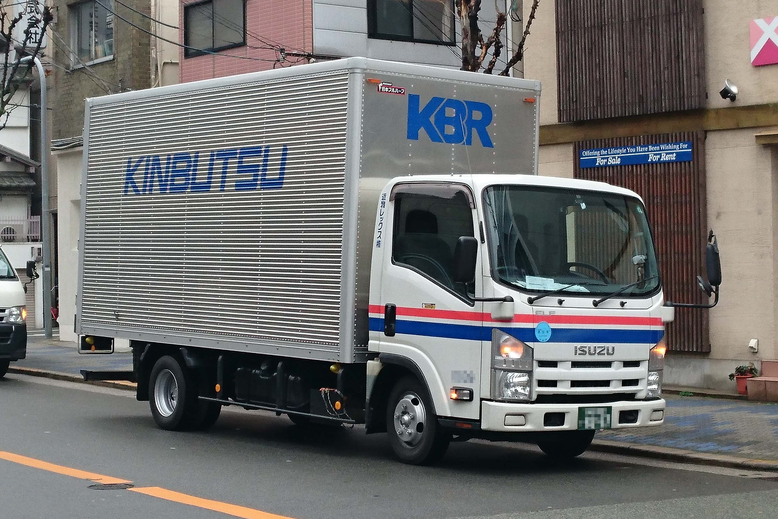 近物レックスのトラックです。